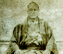 10th yokozuna, Unryū Kyūkichi (1822 - 1890)